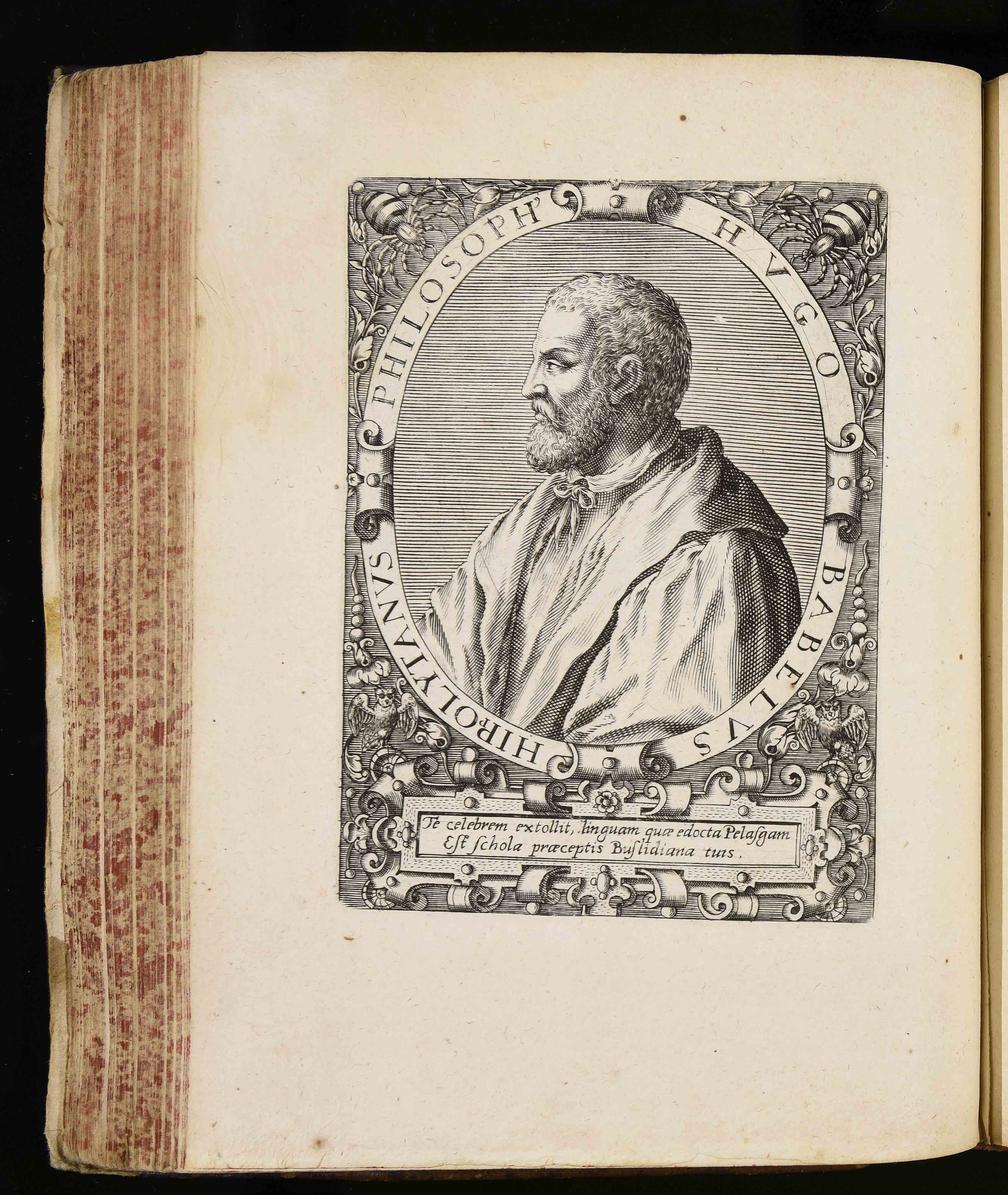 Calcografia in Jean Jacques Boissard, Bibliotheca sive Thesaurus virtutis, Frankfurt am Mein: William Fitzer 1627. Esemplare GI 1 v. c 41 della Biblioteca comunale di Trento, che presenta aggiunte successive.